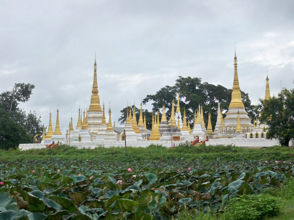 လိုင္-ခ အတြက္စိတ္ဝင္စားစရာအေကာင္းဆုံးဗိမာန္